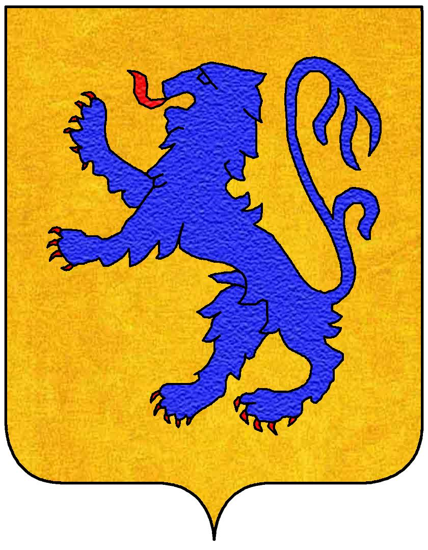 Stemma della famiglia Caracciolo